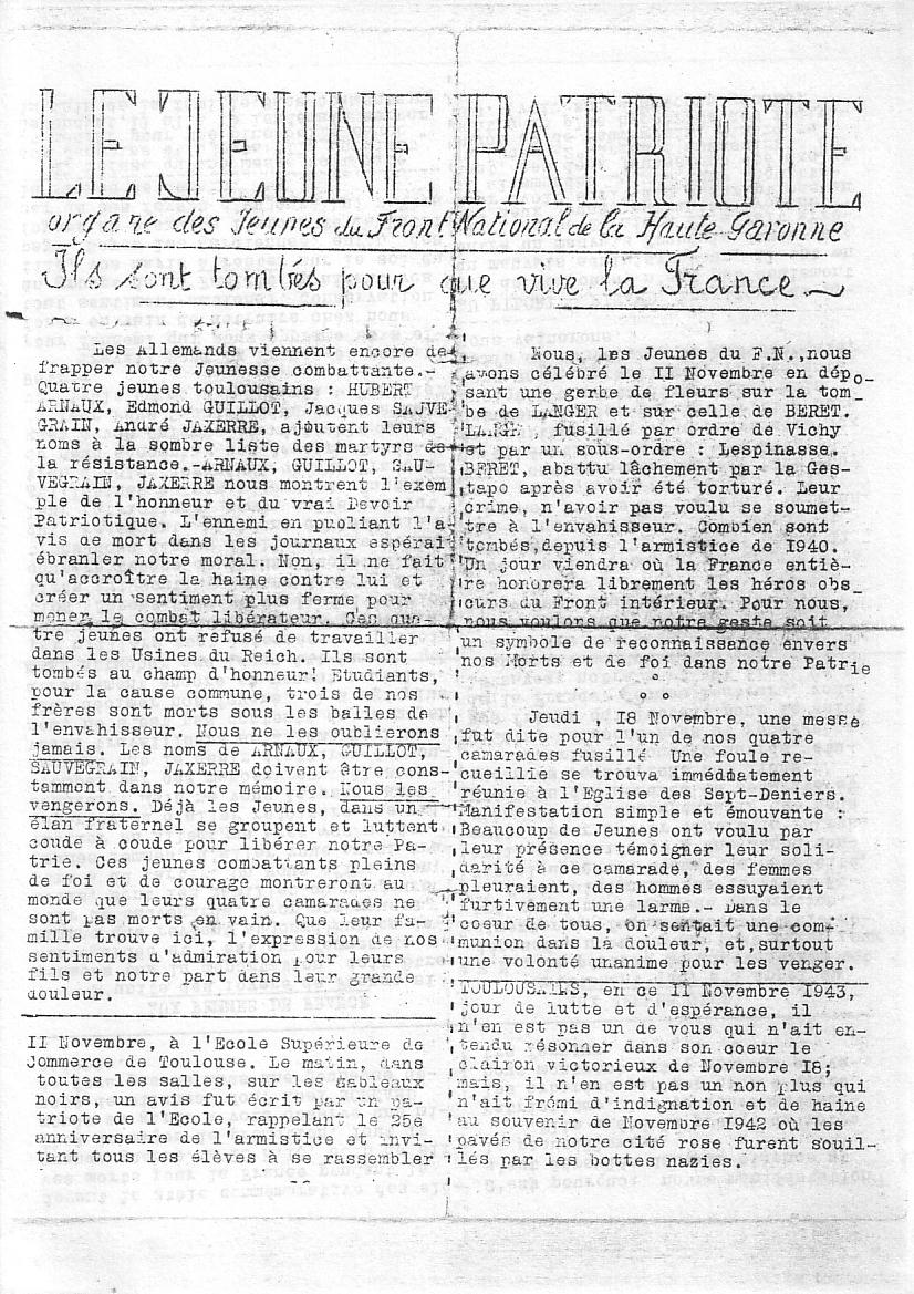 Le Jeune Patriote, tract (recto) distribué au lycée de garçon de Toulouse en novembre 1943.